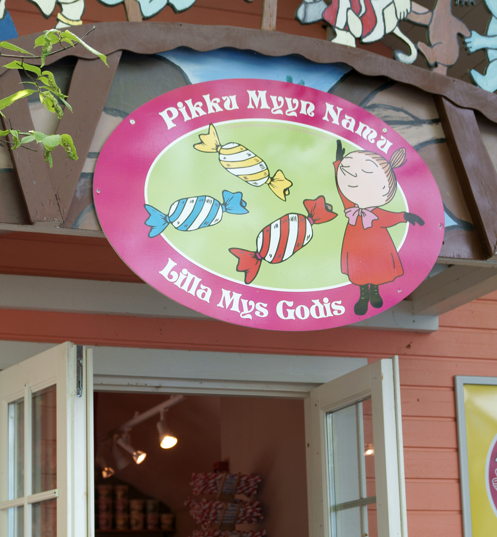 Pikku Myyn nami -makeiskauppa Muumimaailmassa, Naantalissa.